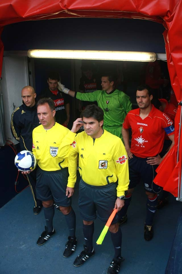 Luis Medina Cantalejo, árbitro internacional español, en el túnel de vestuarios del Estadio Reyno de Navarra de Pamplona, antes del partido entre Osasuna y Sporting. En segunda término el capitán de Osasuna, César Cruchaga.